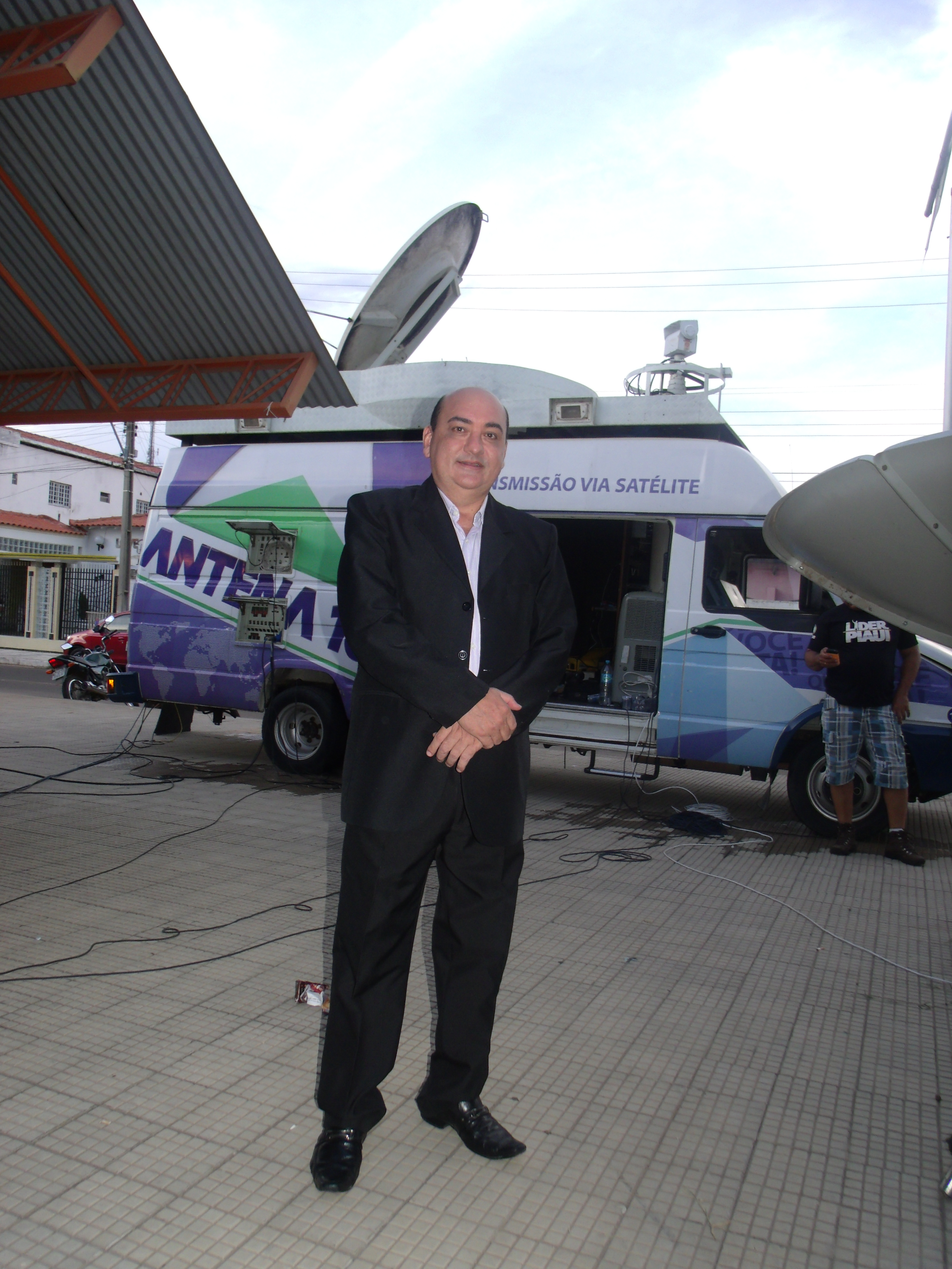 Equipe da Tv Antena 10 em Campo Maior para as transmissões da batalha do jenipapo. Na imagem é o apresentador Arnaldo Ribeiro.